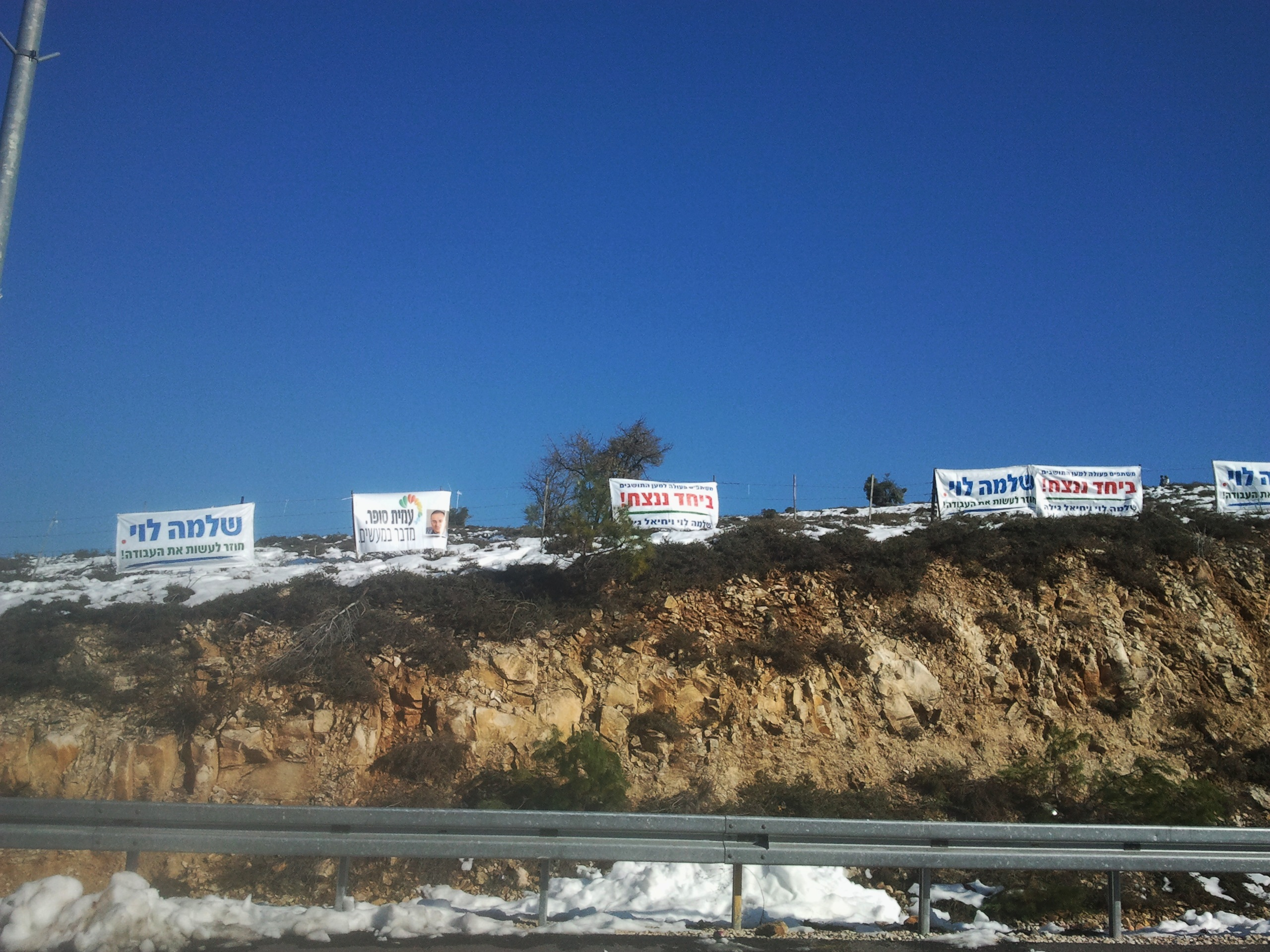 שרידי שלג בצפת בהרים וברחובות שבוע לאחר הסערה הגדולה בדצמבר 2013 שלטי פרסום לבחירות למועצה האזורית מרום הגליל